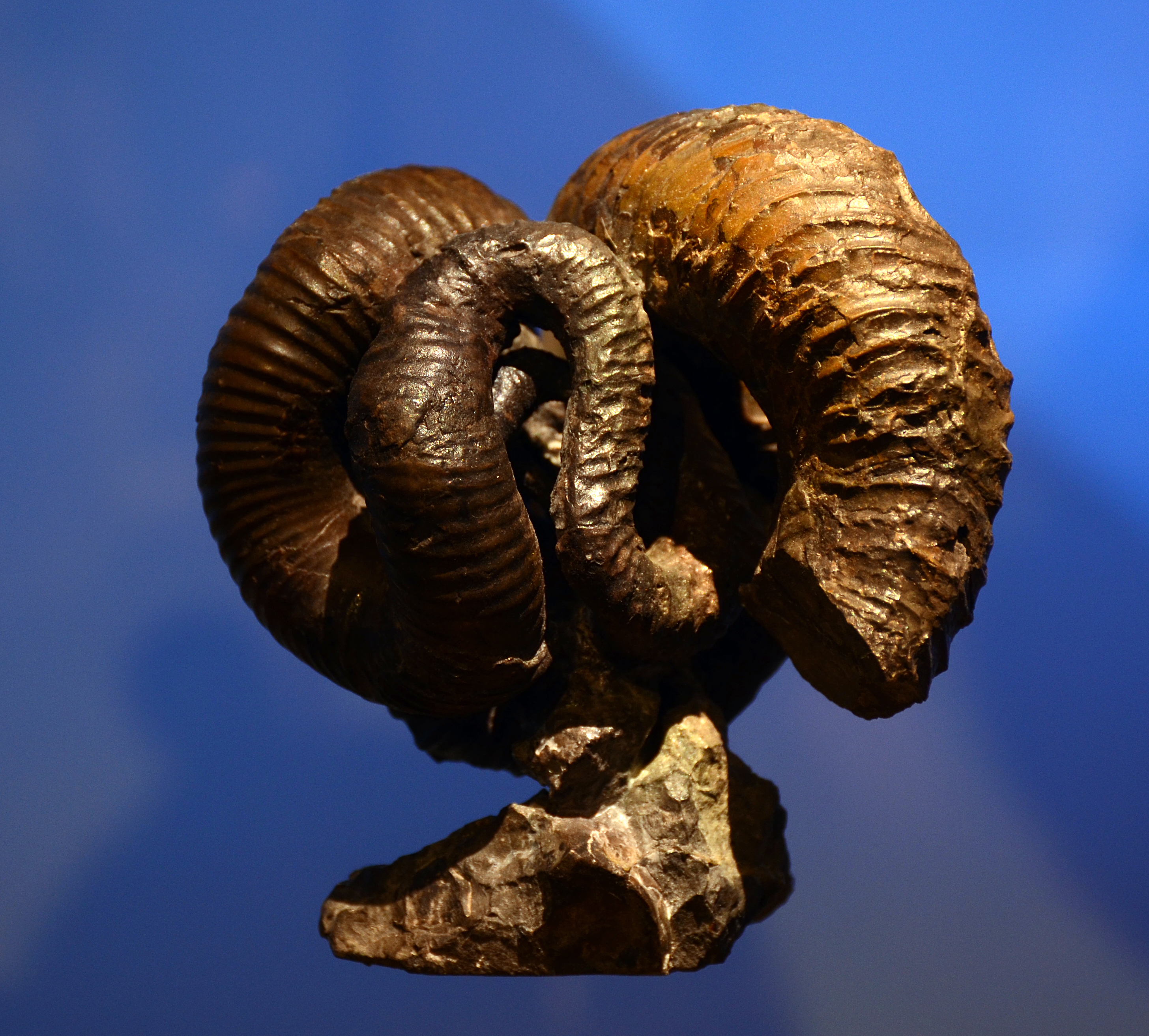 Nipponites mirabilis. Exposé au Musée des Confluences à Lyon.